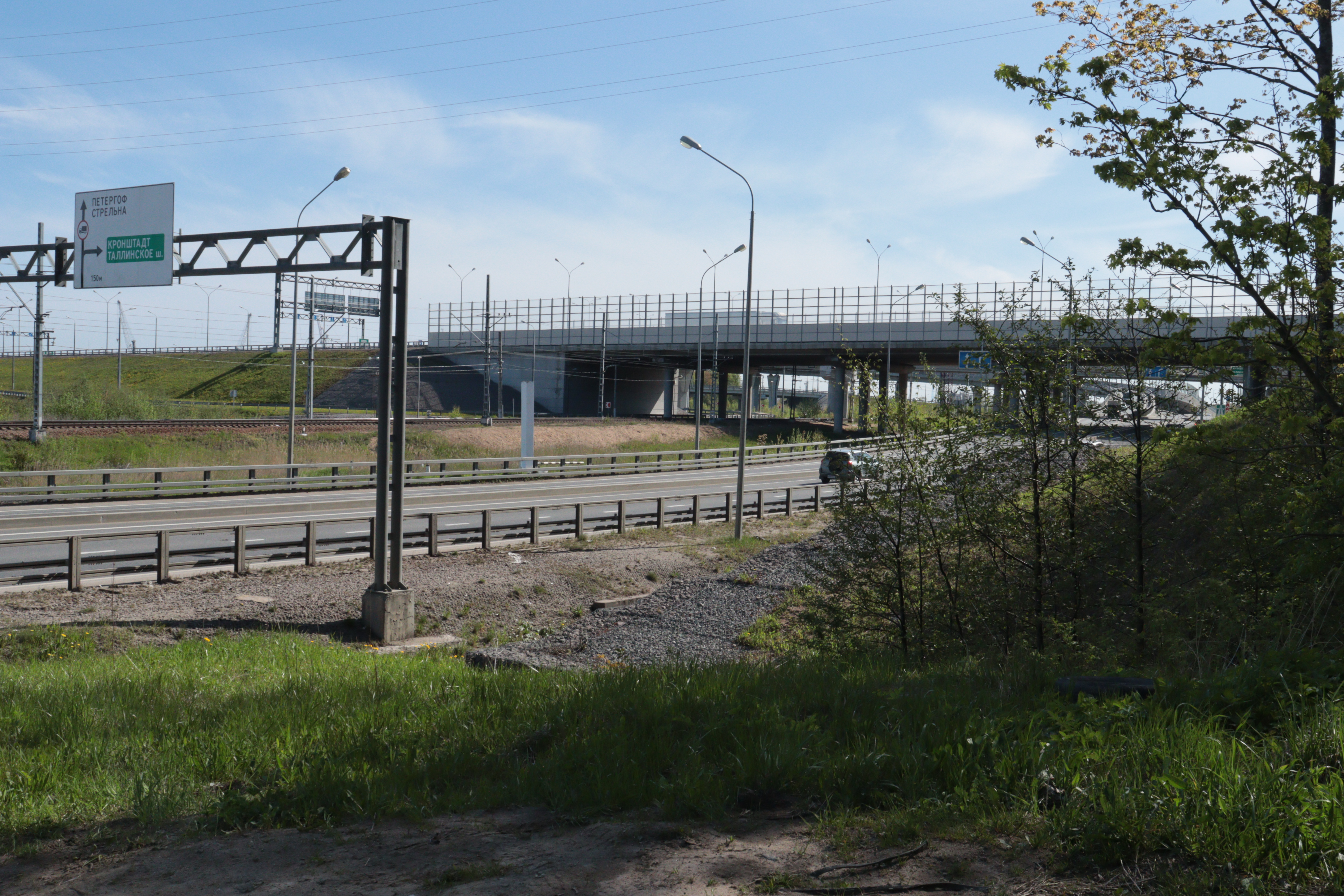 Объект культурного наследия и окрестности. Снято в ходе вики-экспедиции в г. Ломоносов.